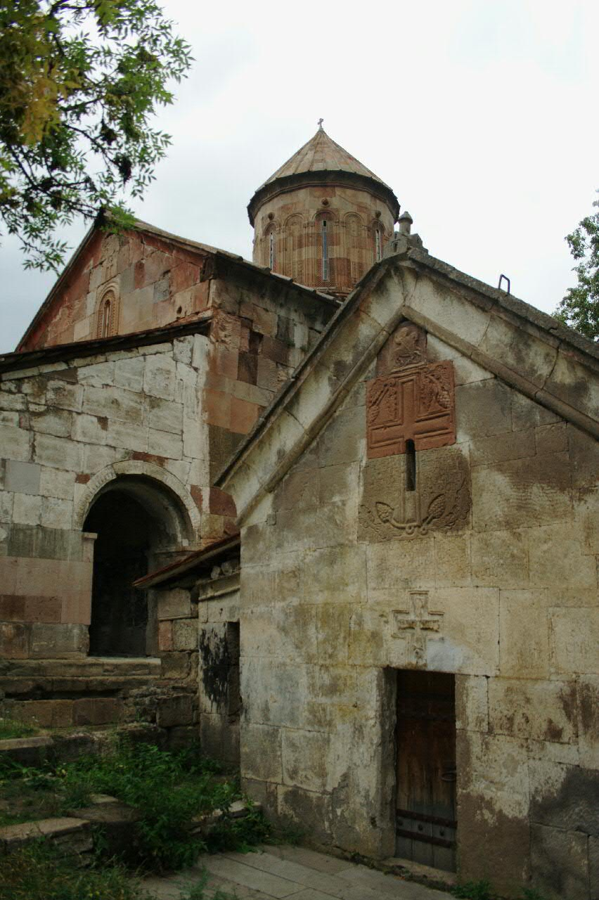 Sapara